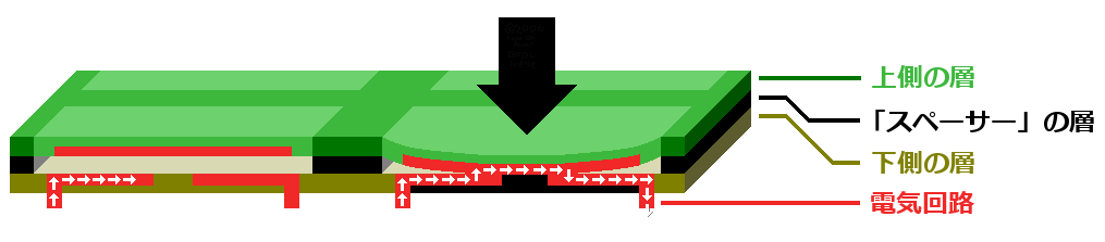 メンブレンキーボード（カード電卓等に使用されるもの）の断面図